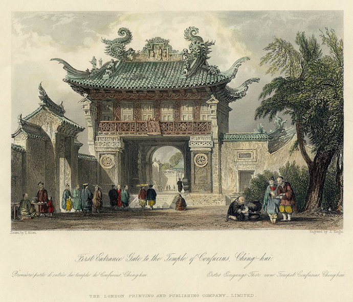 Old Zhenhai in 1860s